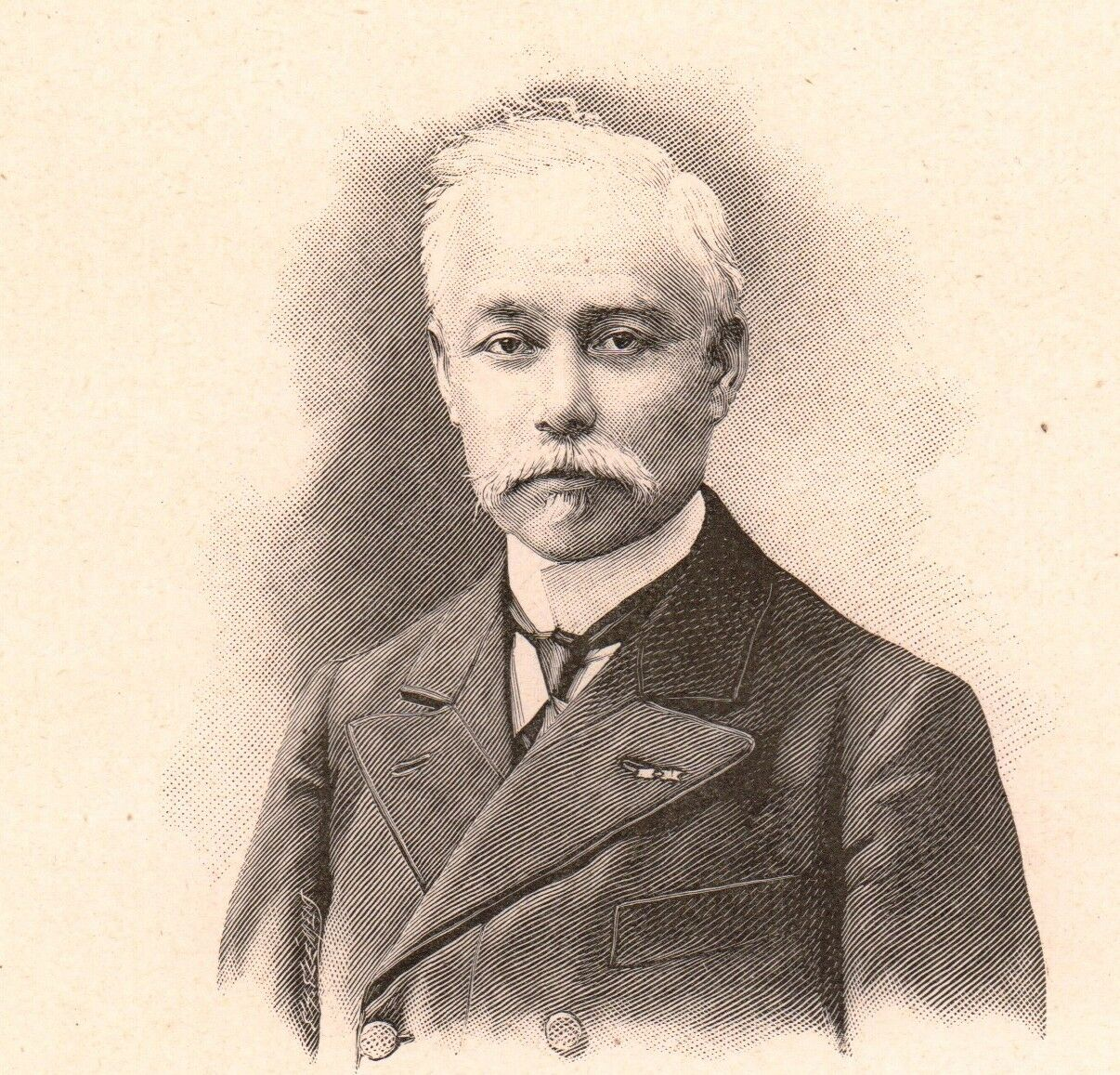 Guillaume Bigourdan (1851-1932), astronome à l'observatoire de Paris et président de l'Académie des sciences